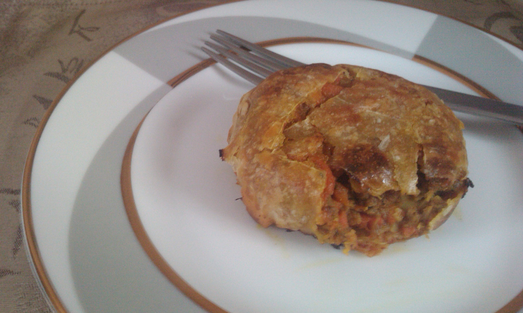 Pastilla d'agneau